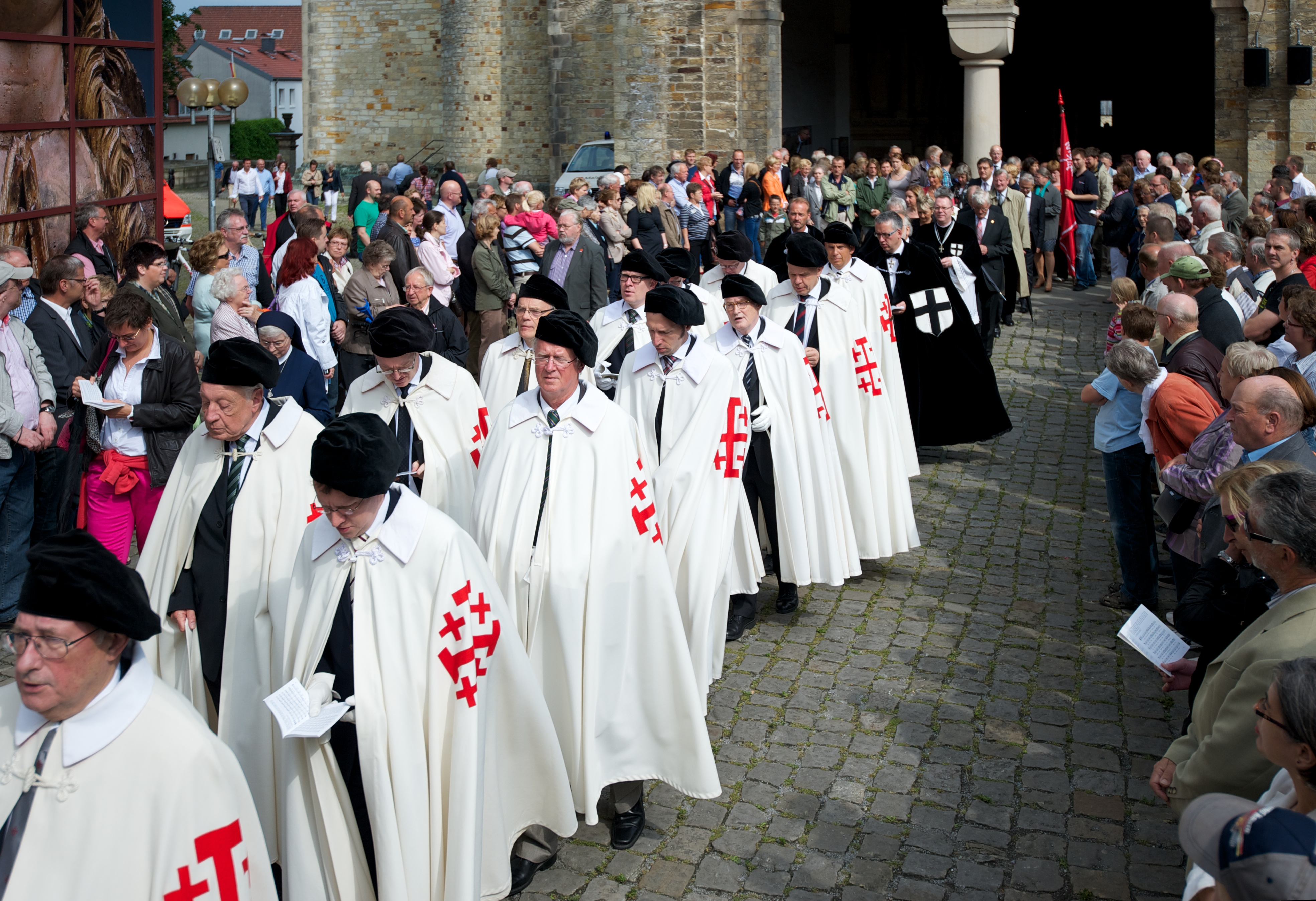 Grabesritter bei der Liboriprozession in Paderborn